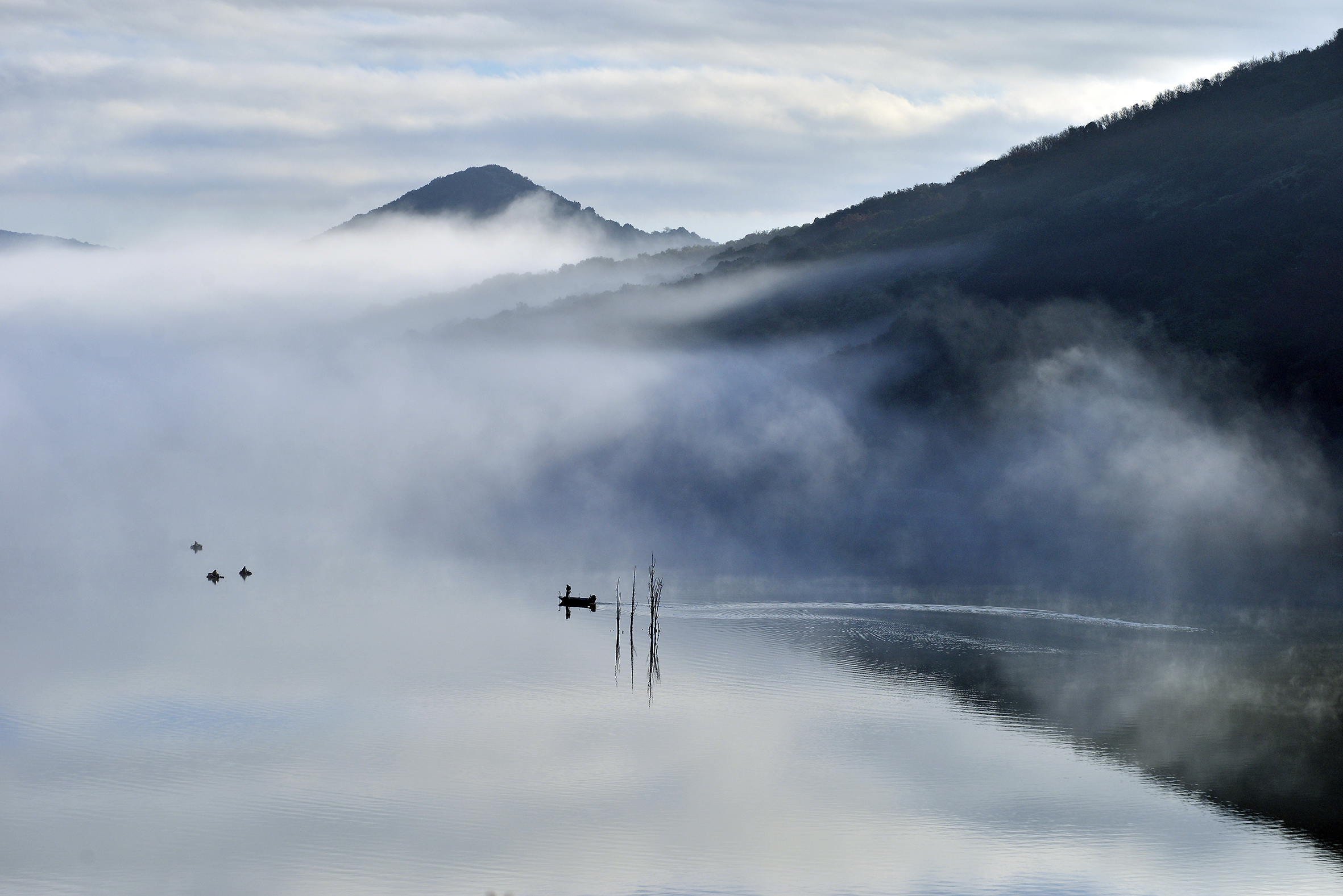 Brume hivernal sur le Salagou vue depuis les Celles